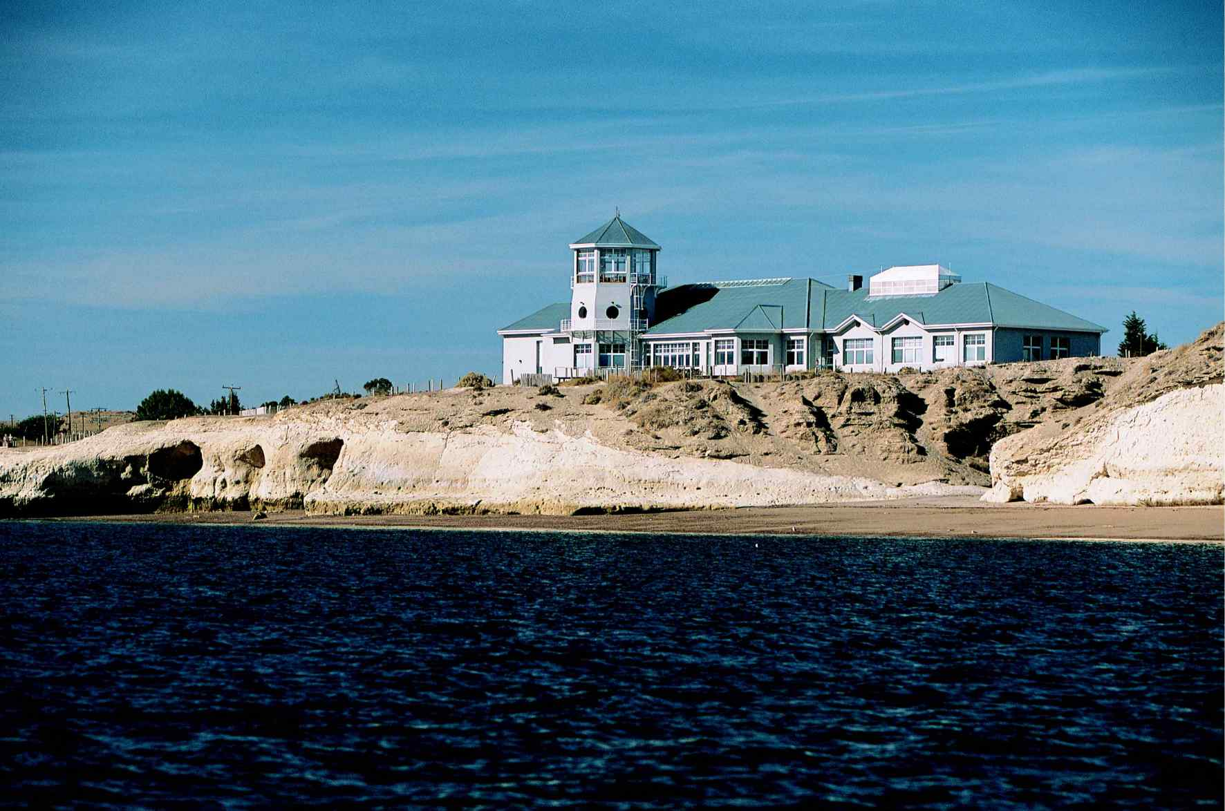 El edificio desde el mar. Fotografía de Claudio Suter